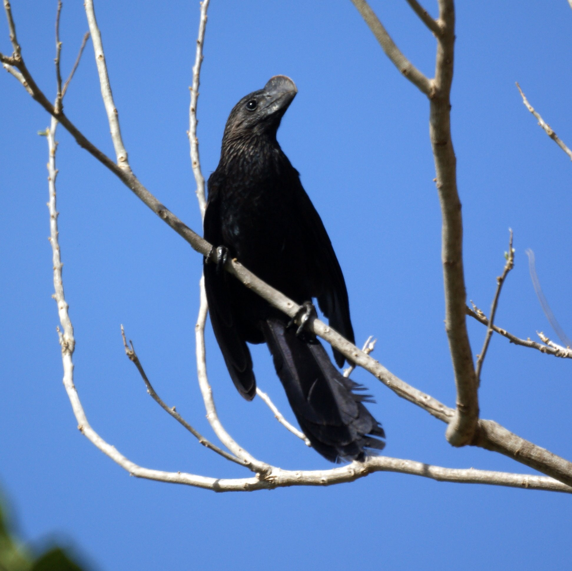 Grenada, March 2010